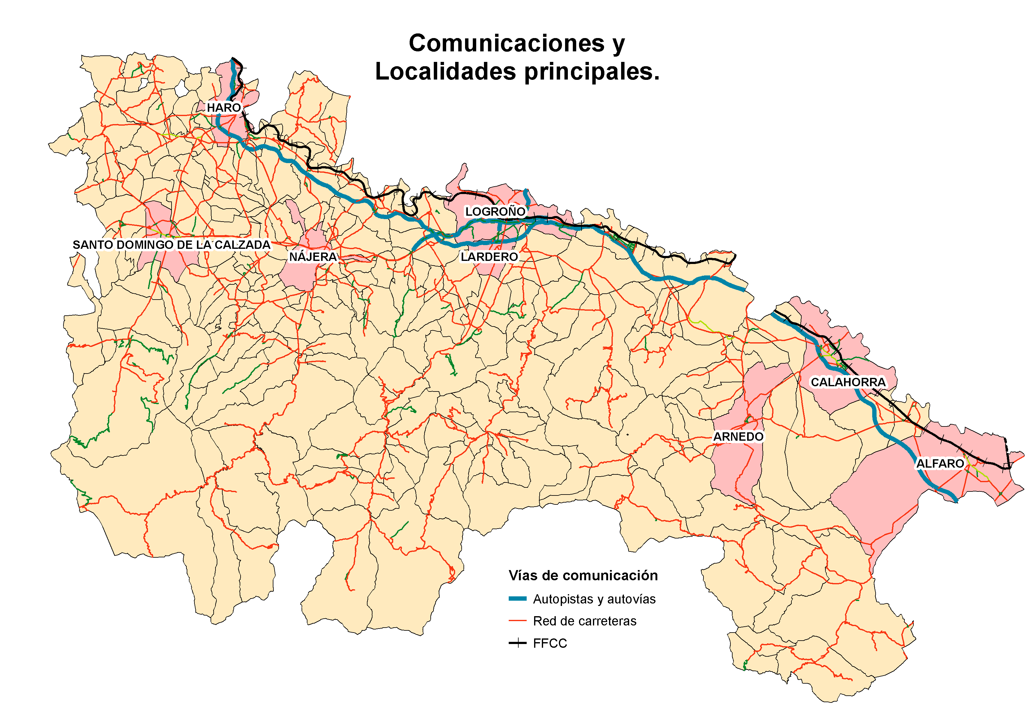 La Rioja, localidades comunicaciones.